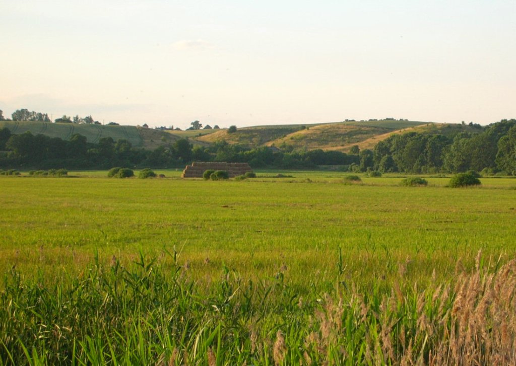 Północne zbocze pradoliny Toruńsko-Eberswaldzkiej między Bydgoszczą, a Nakłem, z rezerwatem przyrody Skarpy Ślesińskie